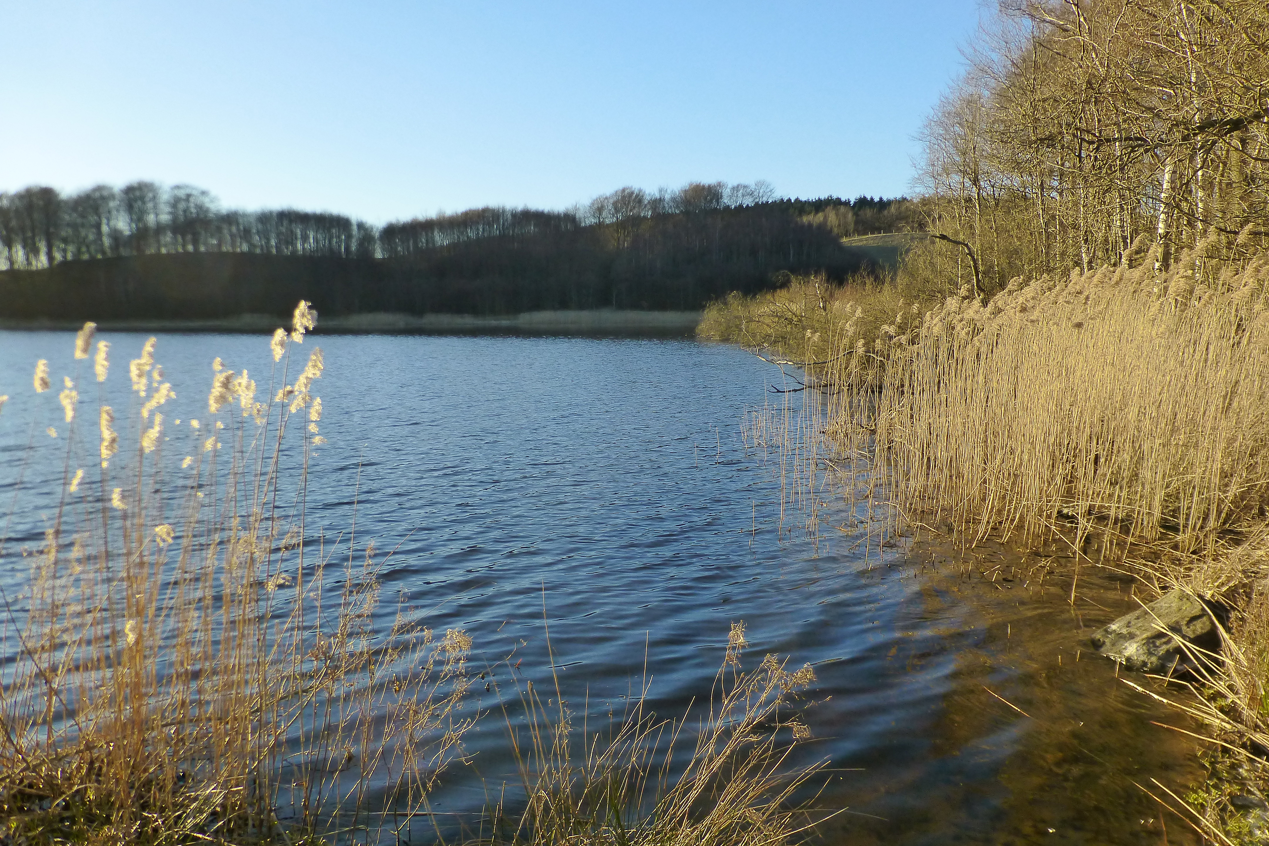 Hummelsø set mod nordvest fra østbredden